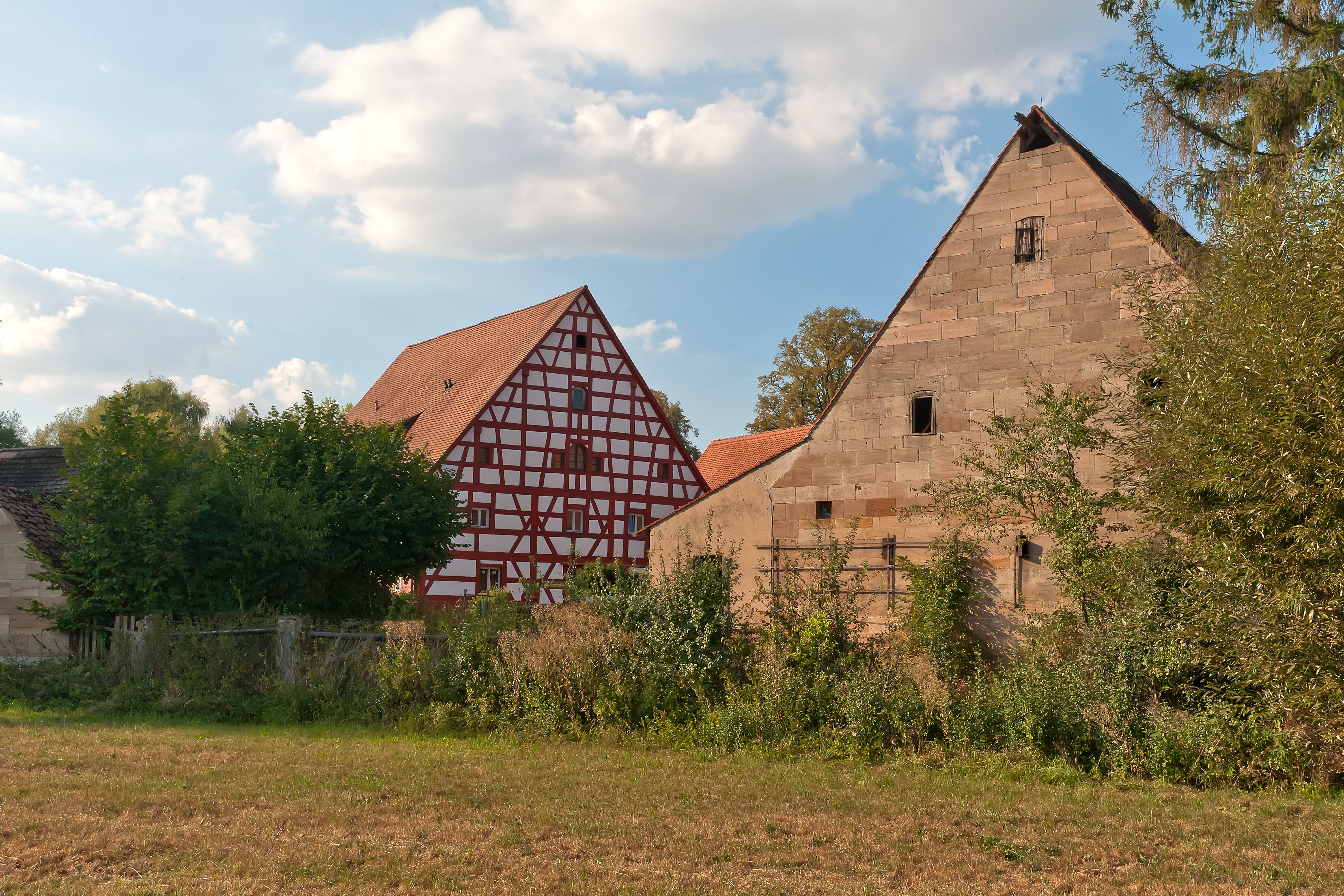 Kohlersmühle; GPS kontrolliert, Daten sind korrekt This is a photograph of an architectural monument.